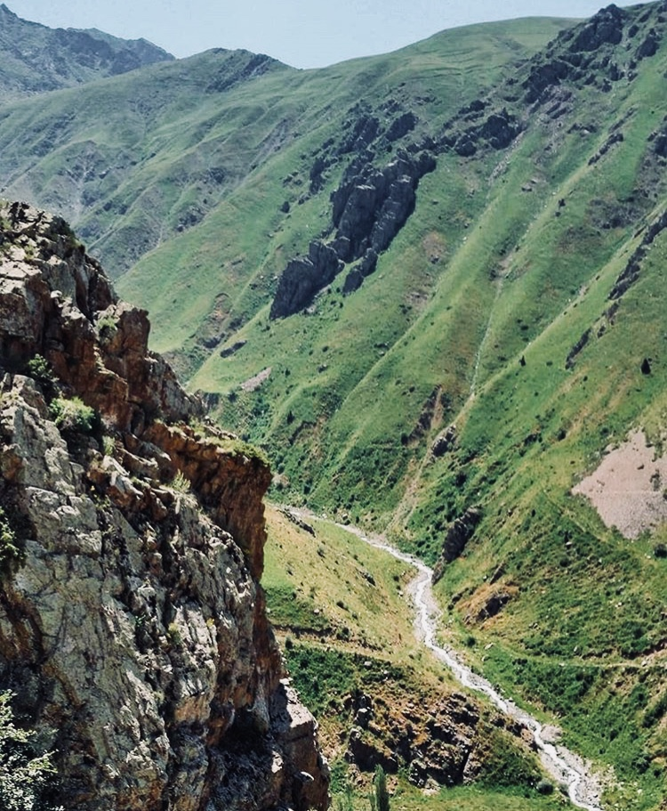 Culfa rayonu